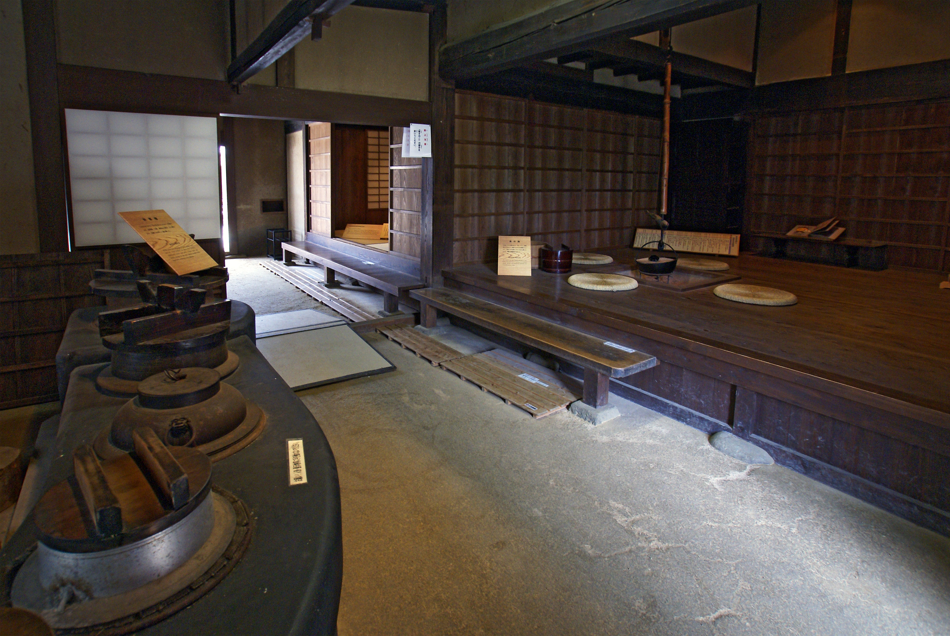 Shunrinken in Kinokawa, Wakayama prefecture, Japan